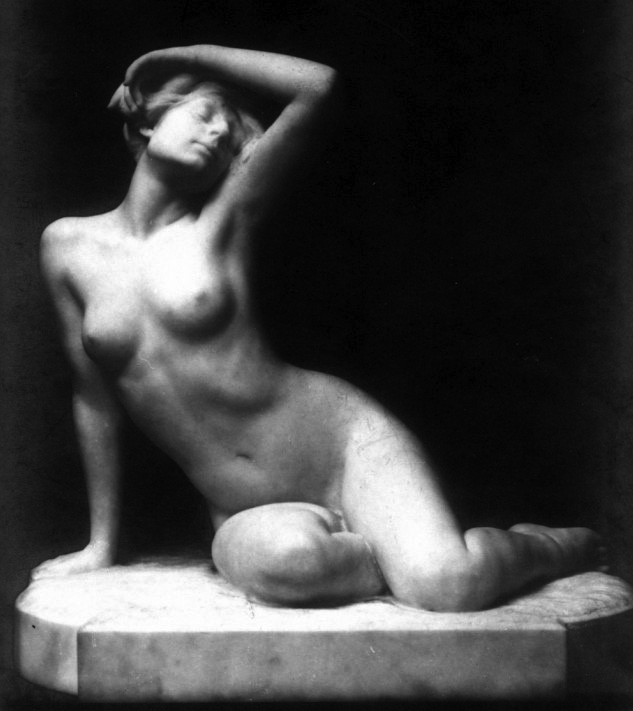 Der Traum von Martin Schauss